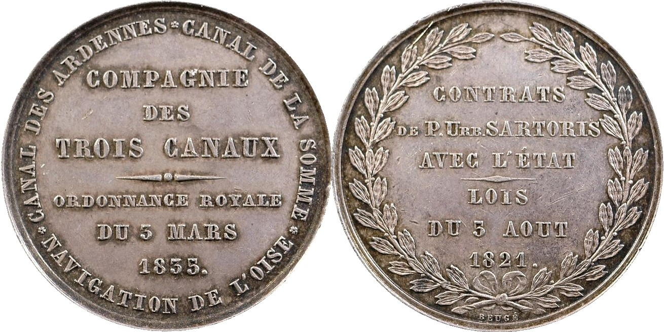 Jeton de la société des trois canaux (1835).